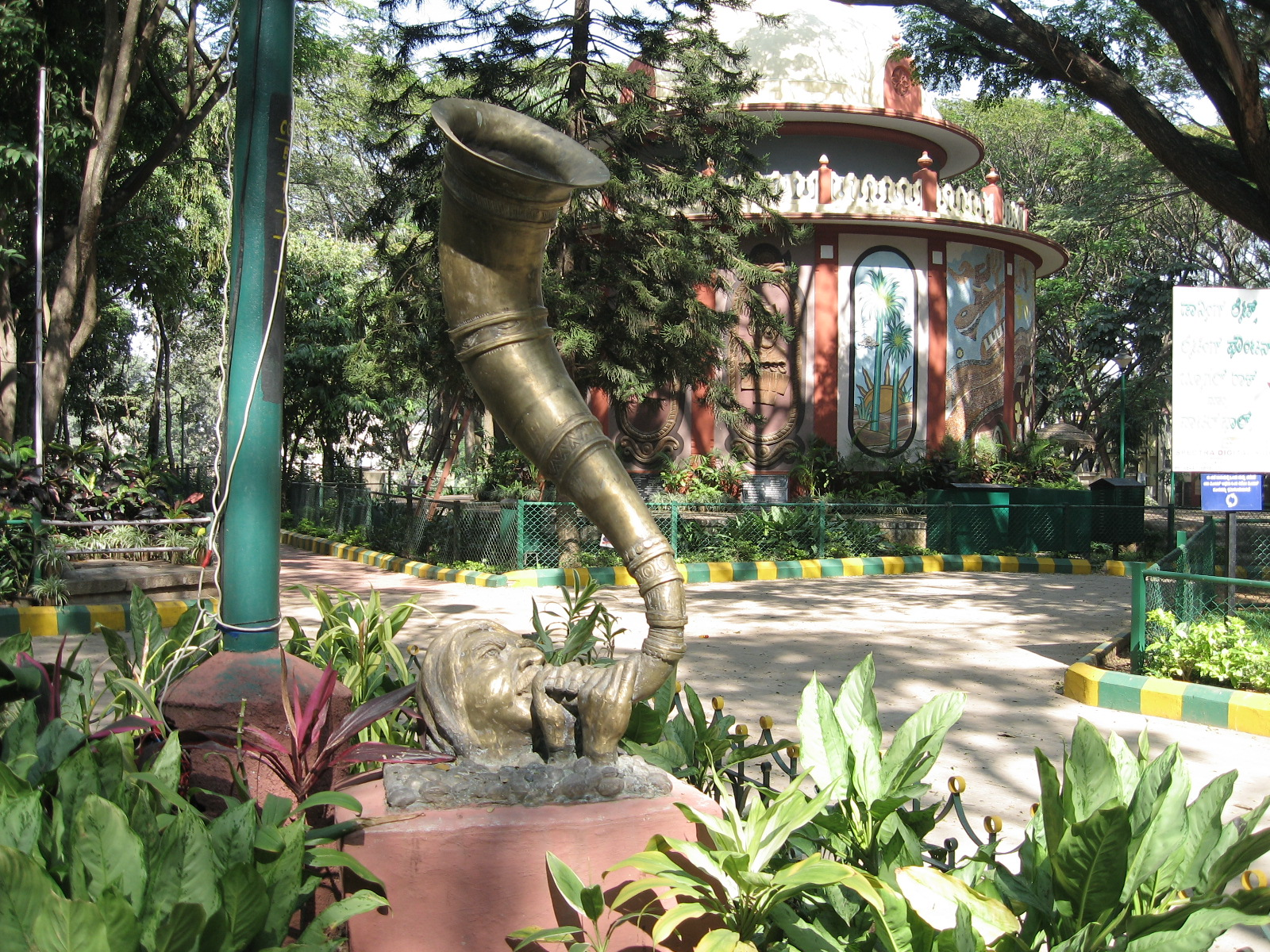 Soldier with Kahale at Bugle Rock, Bengaluru.